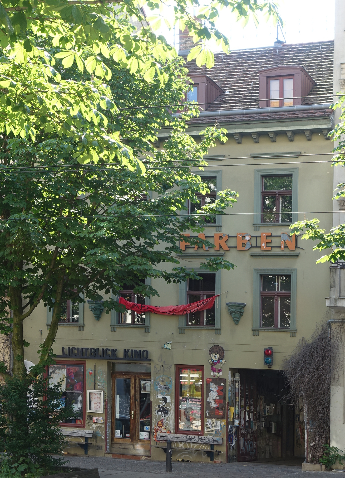 Mietshaus